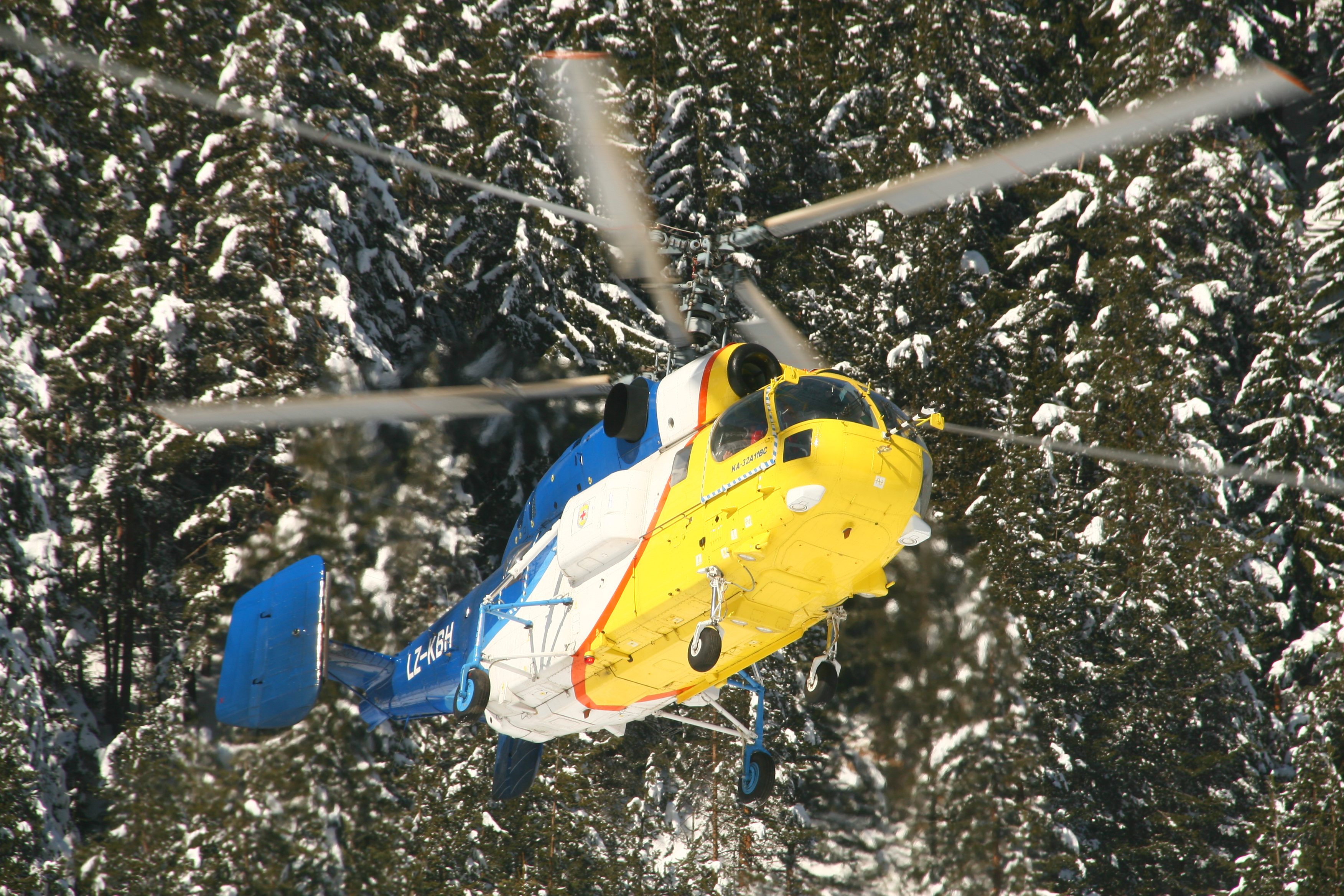 Вертолет Ка-32А11ВС (LZ-KBH) на българският авиационен оператор BH Heli